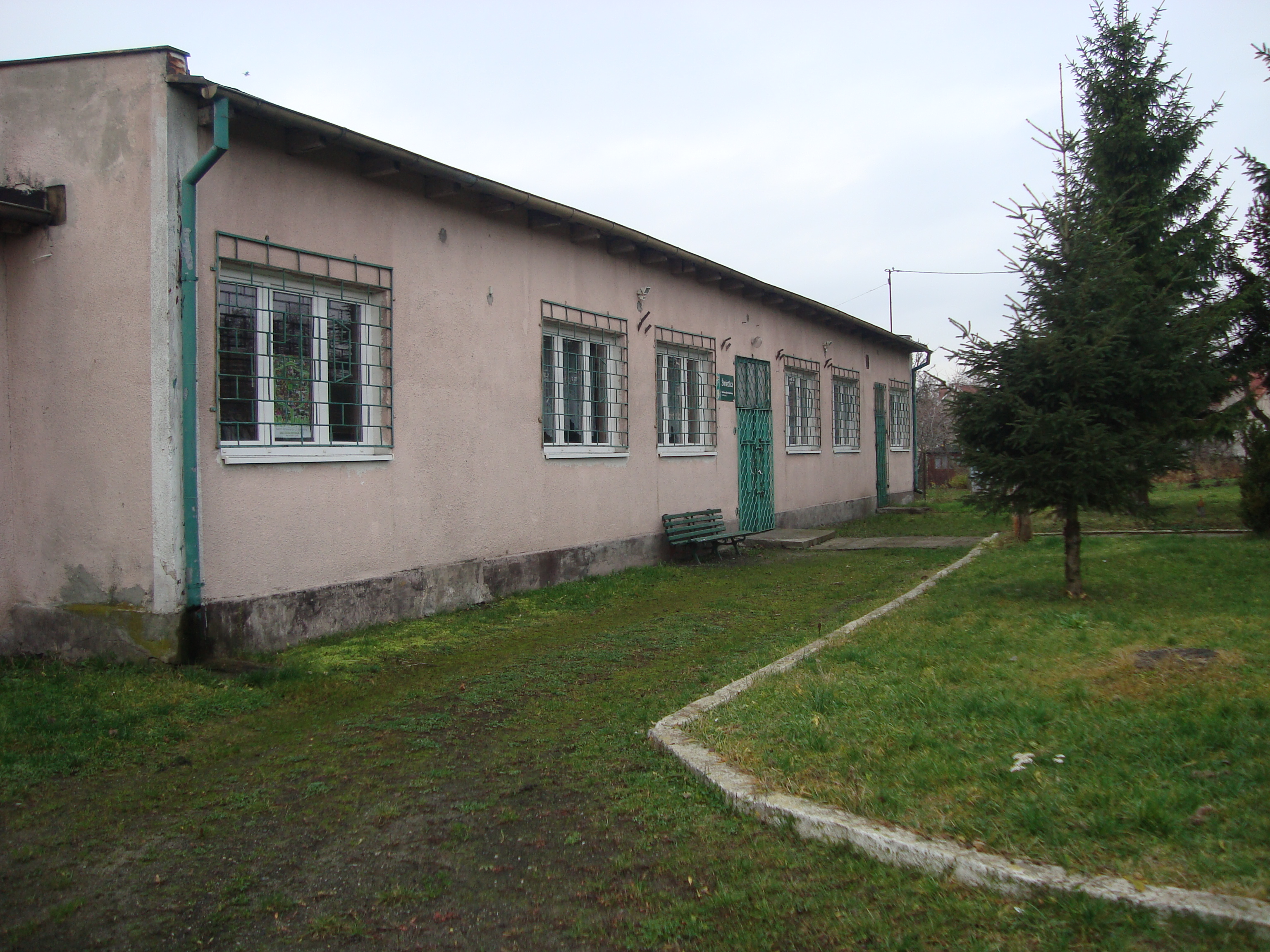 Kaplica parafialna bł. Franciszki Siedliskiej w Elblągu w latach 1990-2003